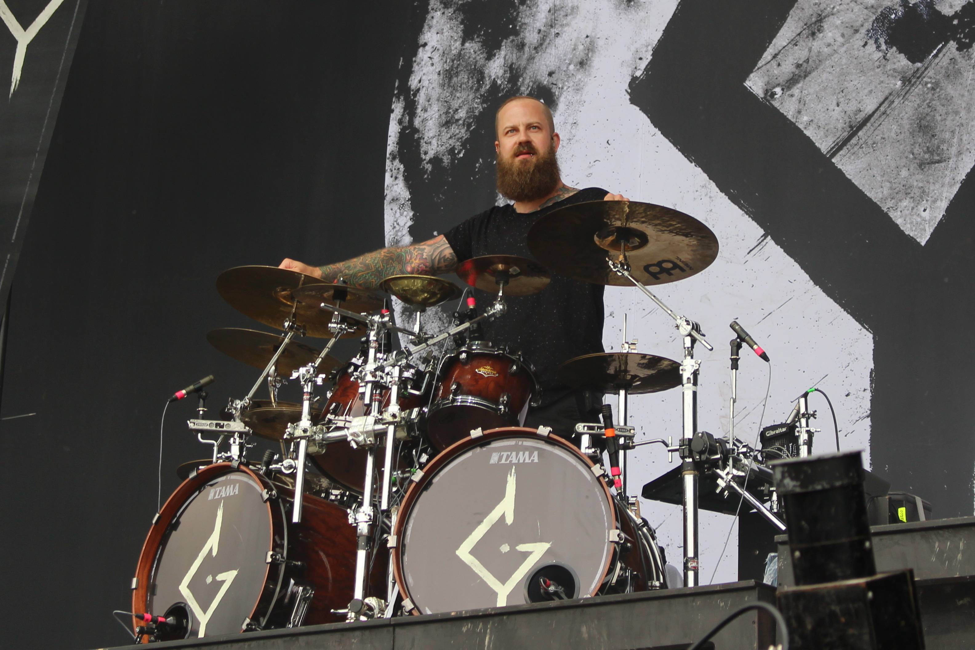 Festivalsommer This photo was created with the support of donations to Wikimedia Deutschland in the context of the CPB project "Festival Summer".